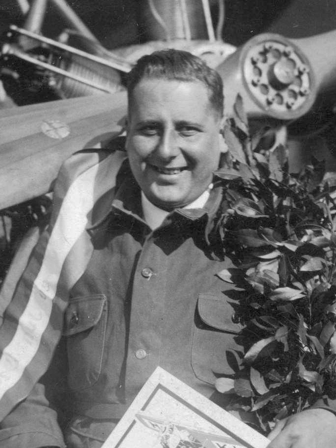 Onderscheiding van Dhr. Frits Koolhoven voor vlucht met twee-zitter "Pander". Waalhaven 20 juni 1920